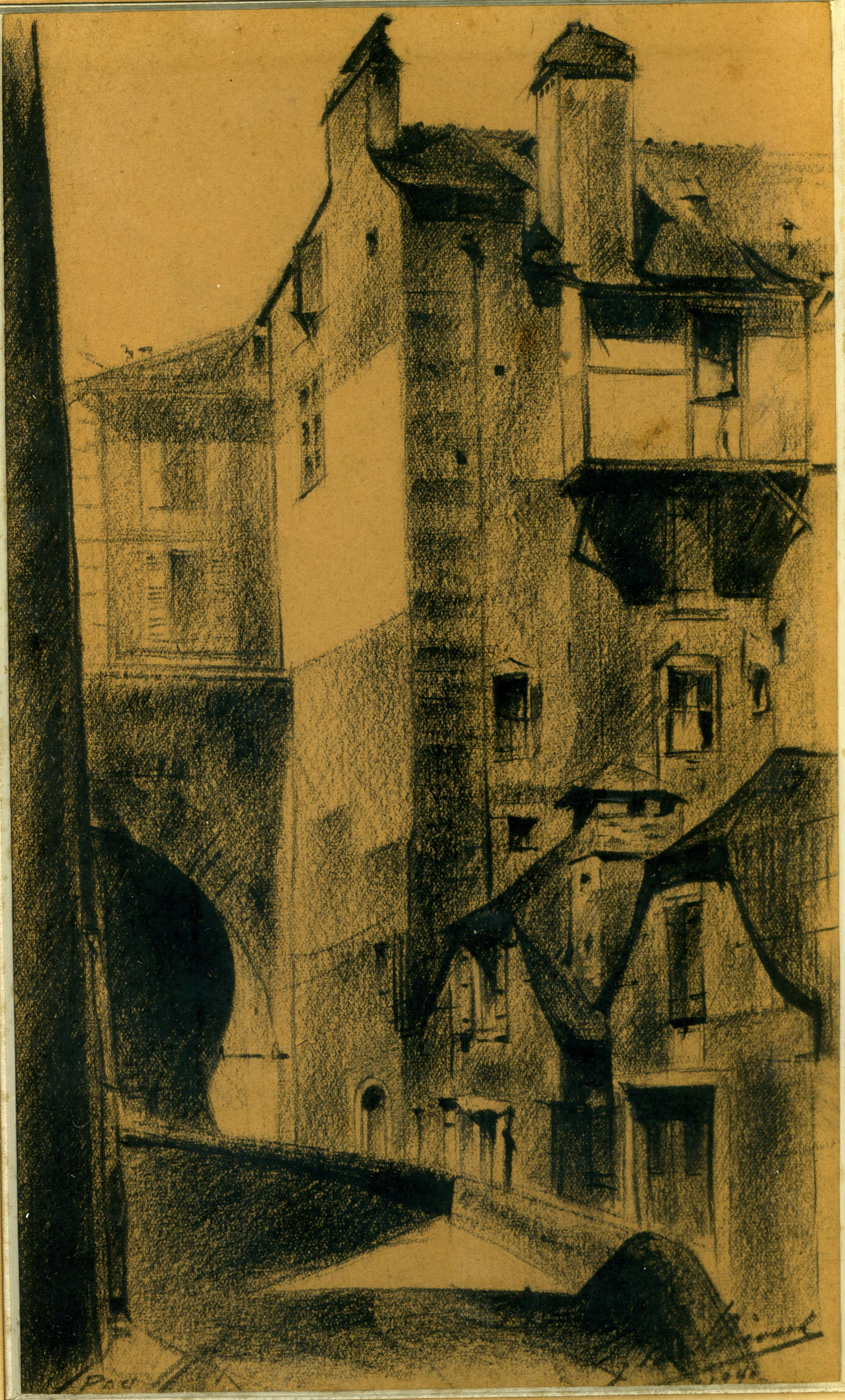 PAU dessin par Léon van_Dievoet, 13 juillet 1940